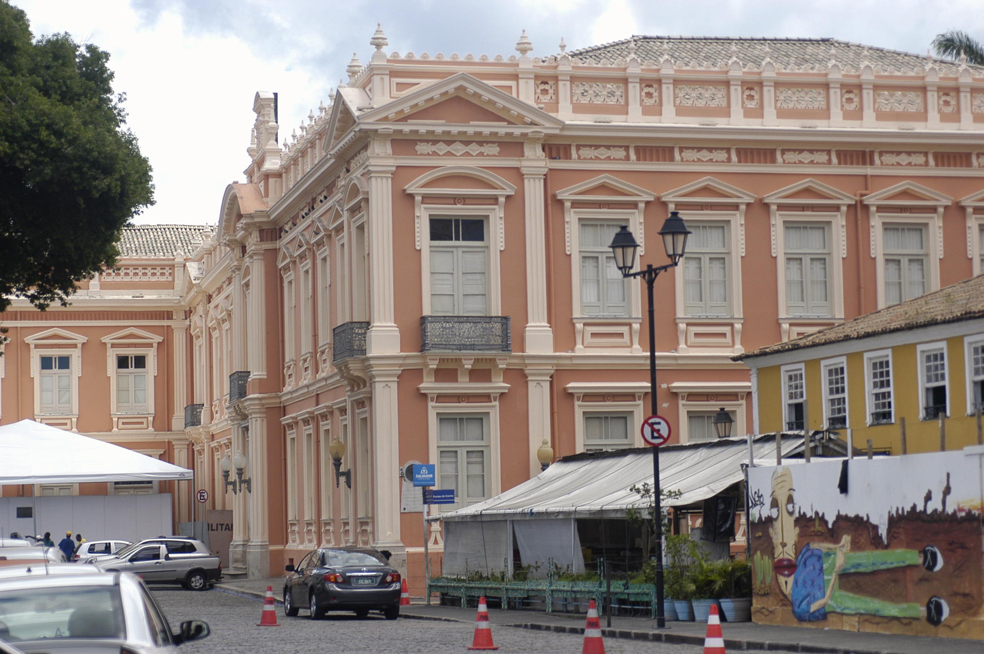 Primeira Faculdade de Medicina do Brasil inaugurada em Salvador, Bahia 1808, onde já funcionava o Hospital Real Militar, no prédio que integrava o Colégio dos Jesuítas, cuja igreja construída no séc XVII é a atual Catedral Basílica Primacial São Salvador. (reconstruído após incêndio de 1905)